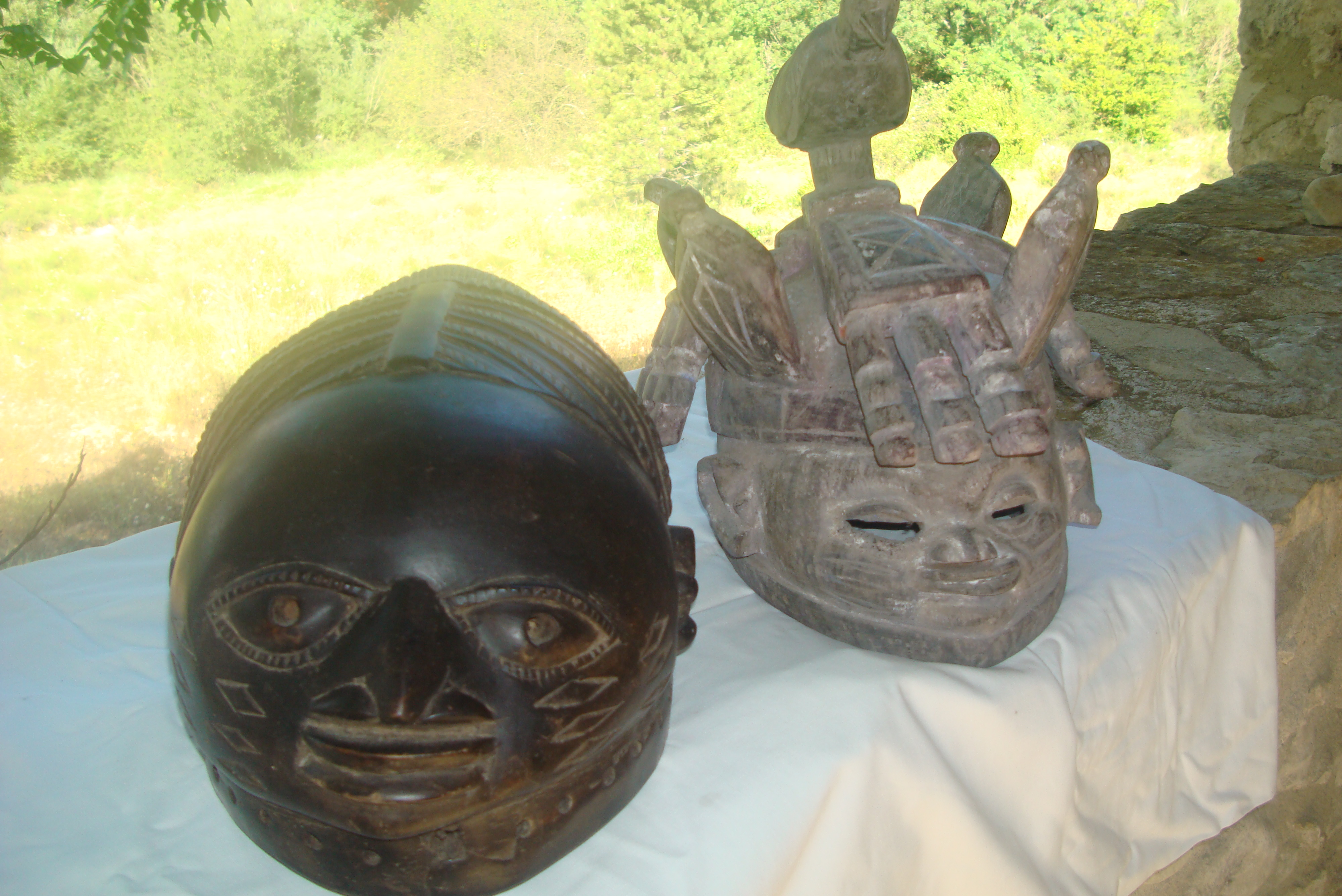 Guelede, Orossi, Benin